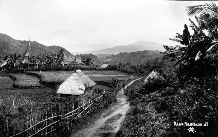 Foto. Dorpsgezicht, Palembajan